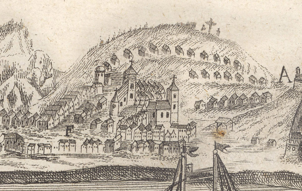 Buda, Tabán és a Naphegy ábrázolása a XVIII sz. végén.